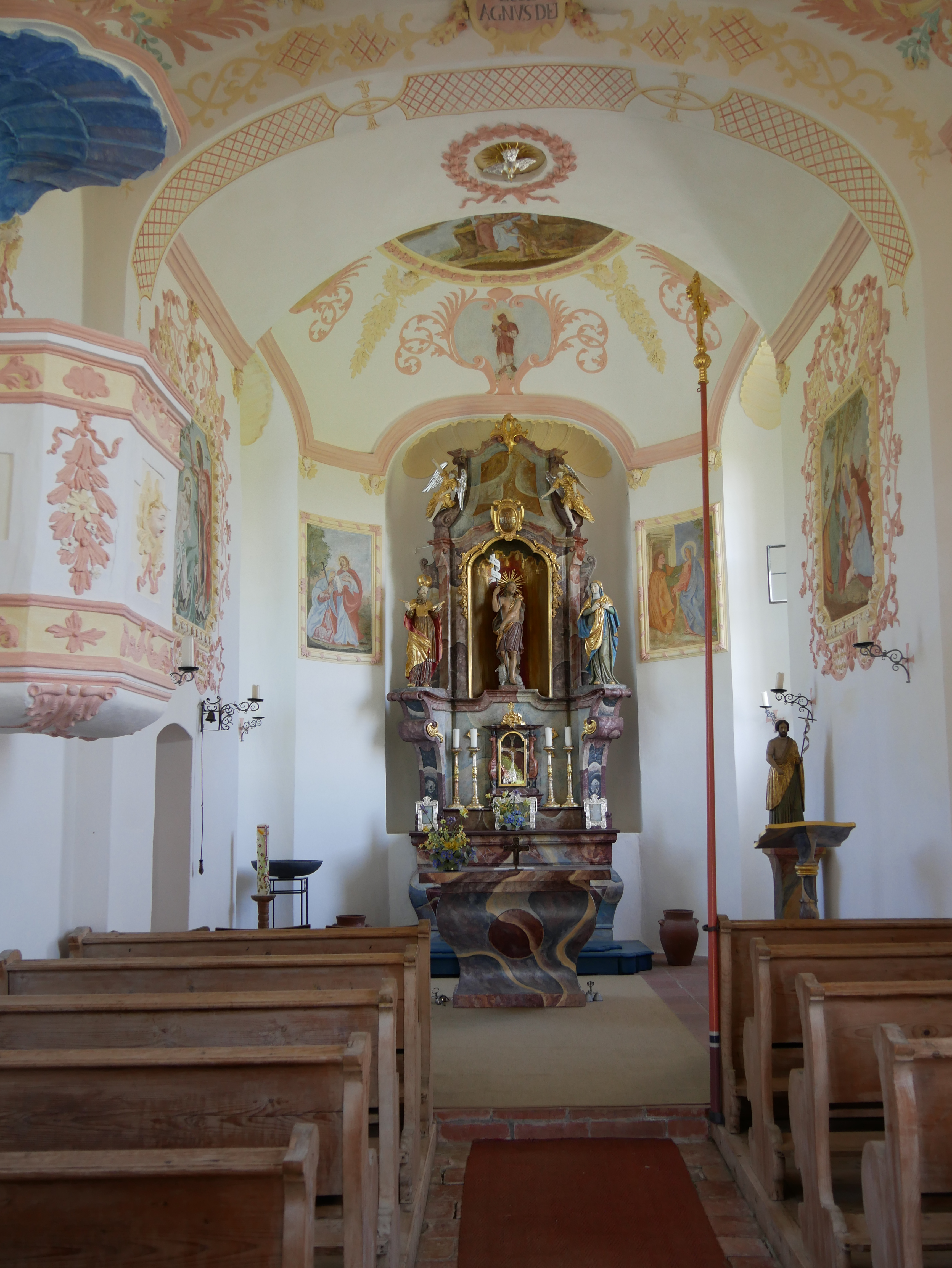 Sankt Johann. Detail: Innenaufnahme in Richtung O